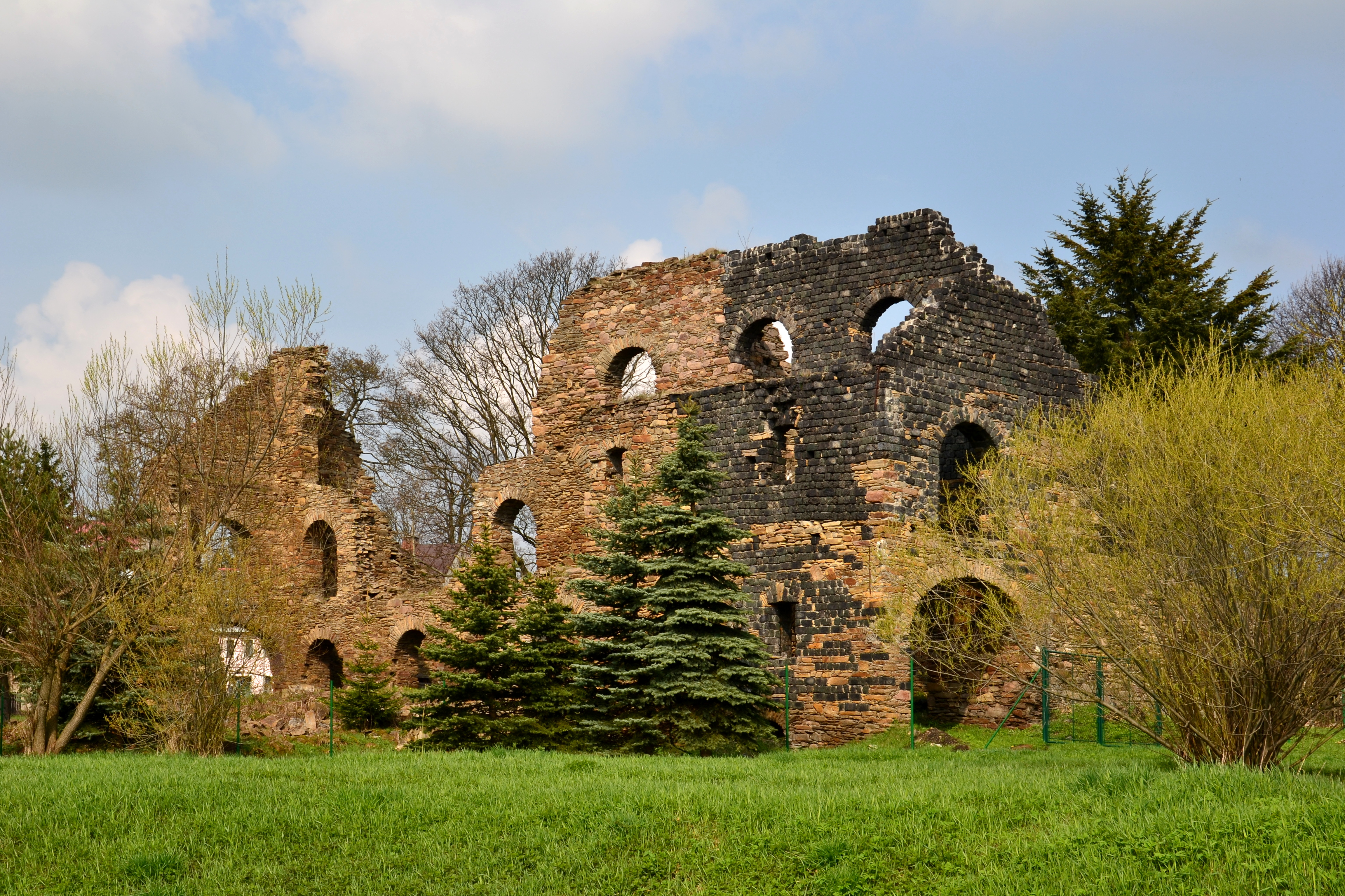 Železárna - uhelna (Kovářská), Kovářská